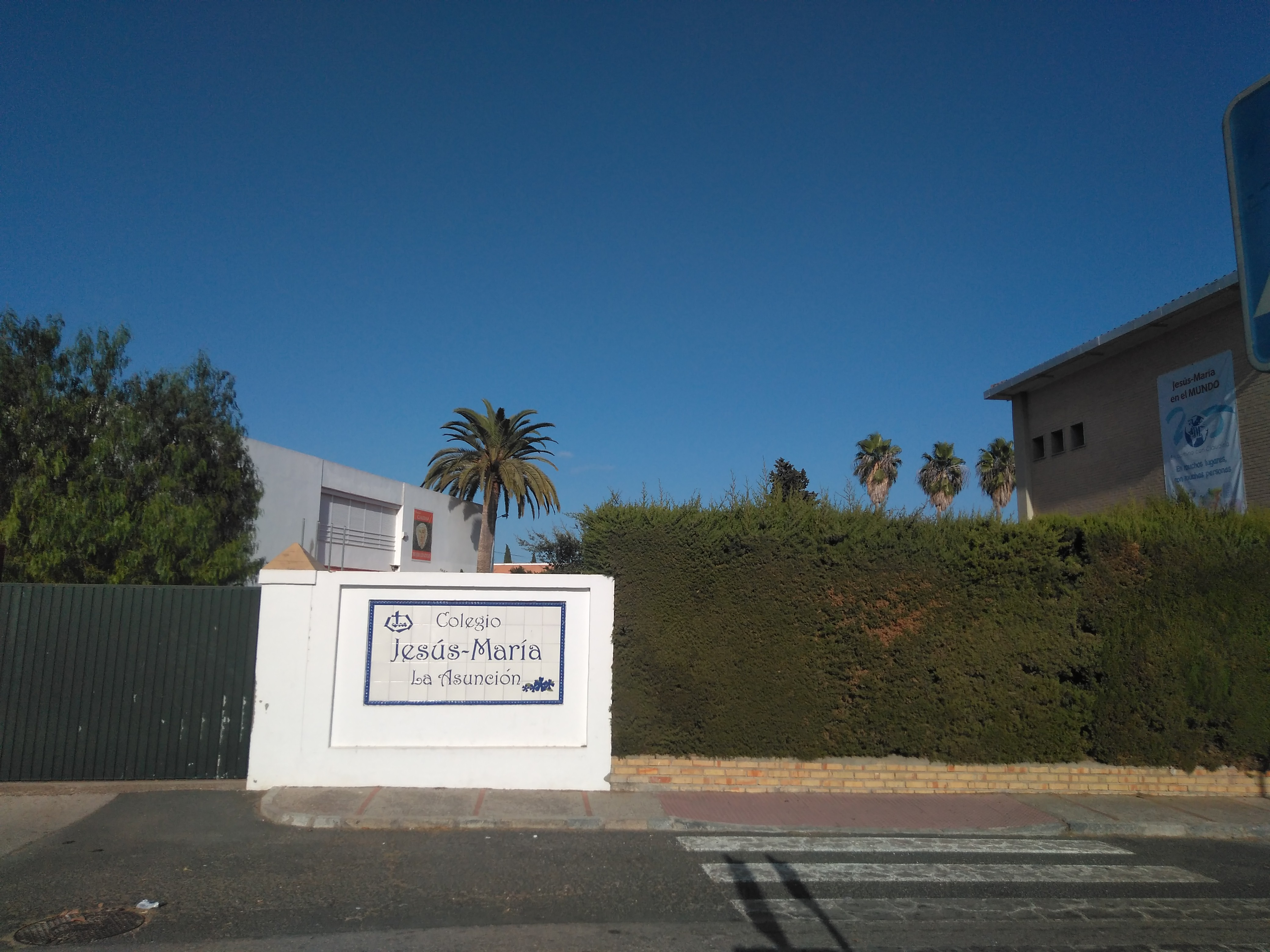 Cartel del Claudina Thévenet edificio de Colegio Jesús-María "La Asunción" en Jerez de la Frontera (España)